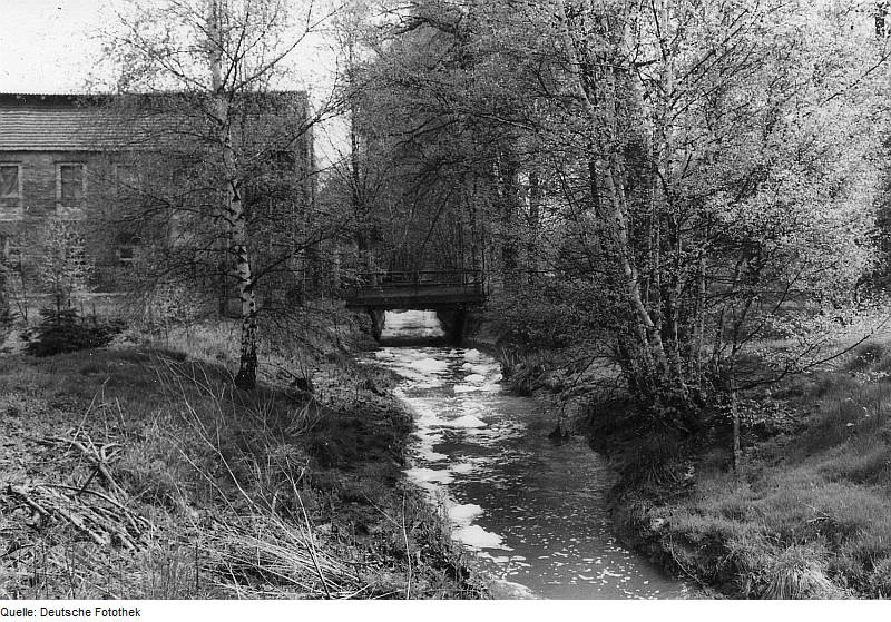 Original image description from the Deutsche Fotothek Spreetal-Neustadt (Spree). Ehem. Spinnerei mit Struga-Bach